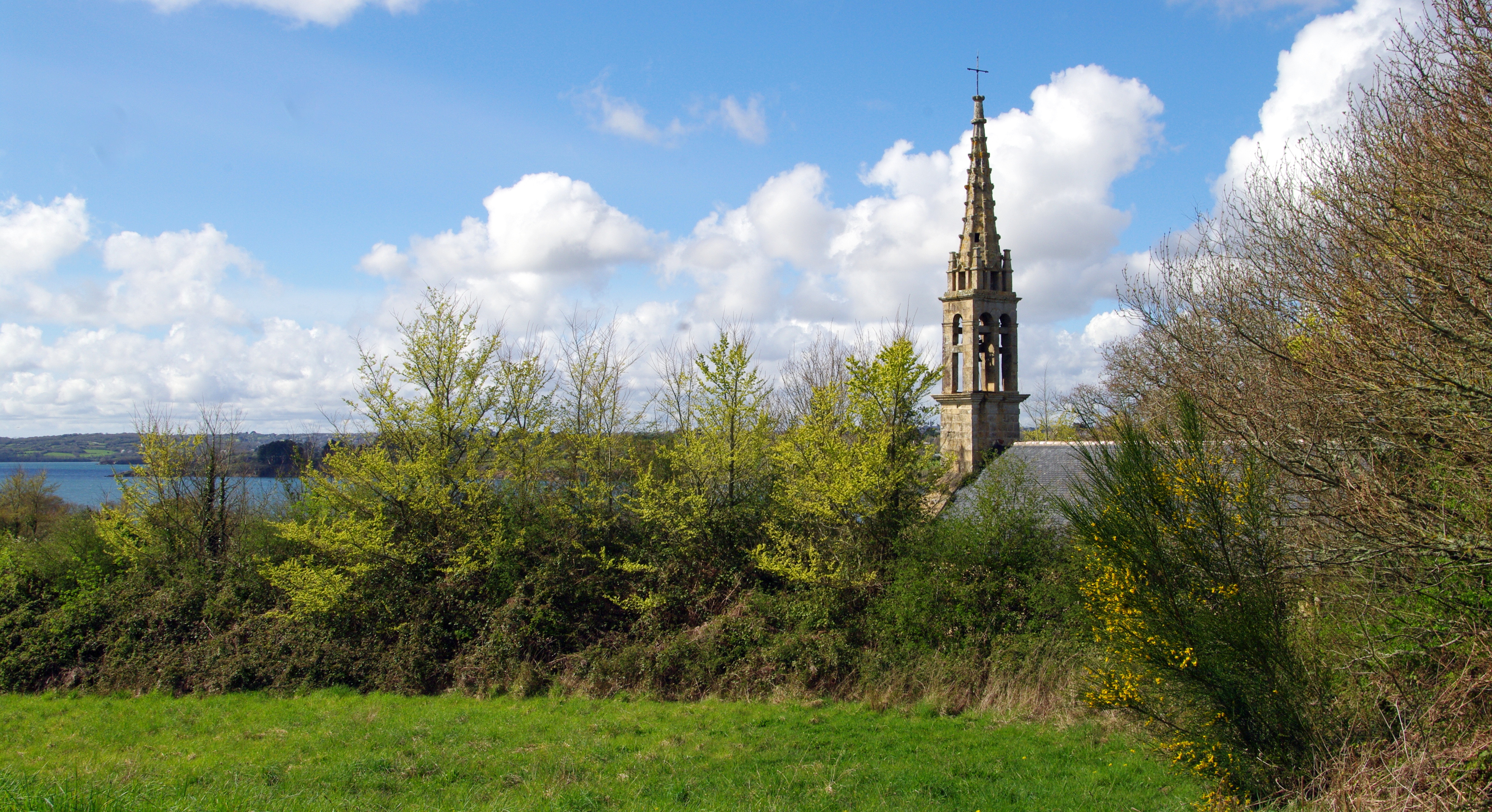 Logonna-Daoulas, chapelle Saint-Jean-Baptiste (XVIIe siècle).JPG